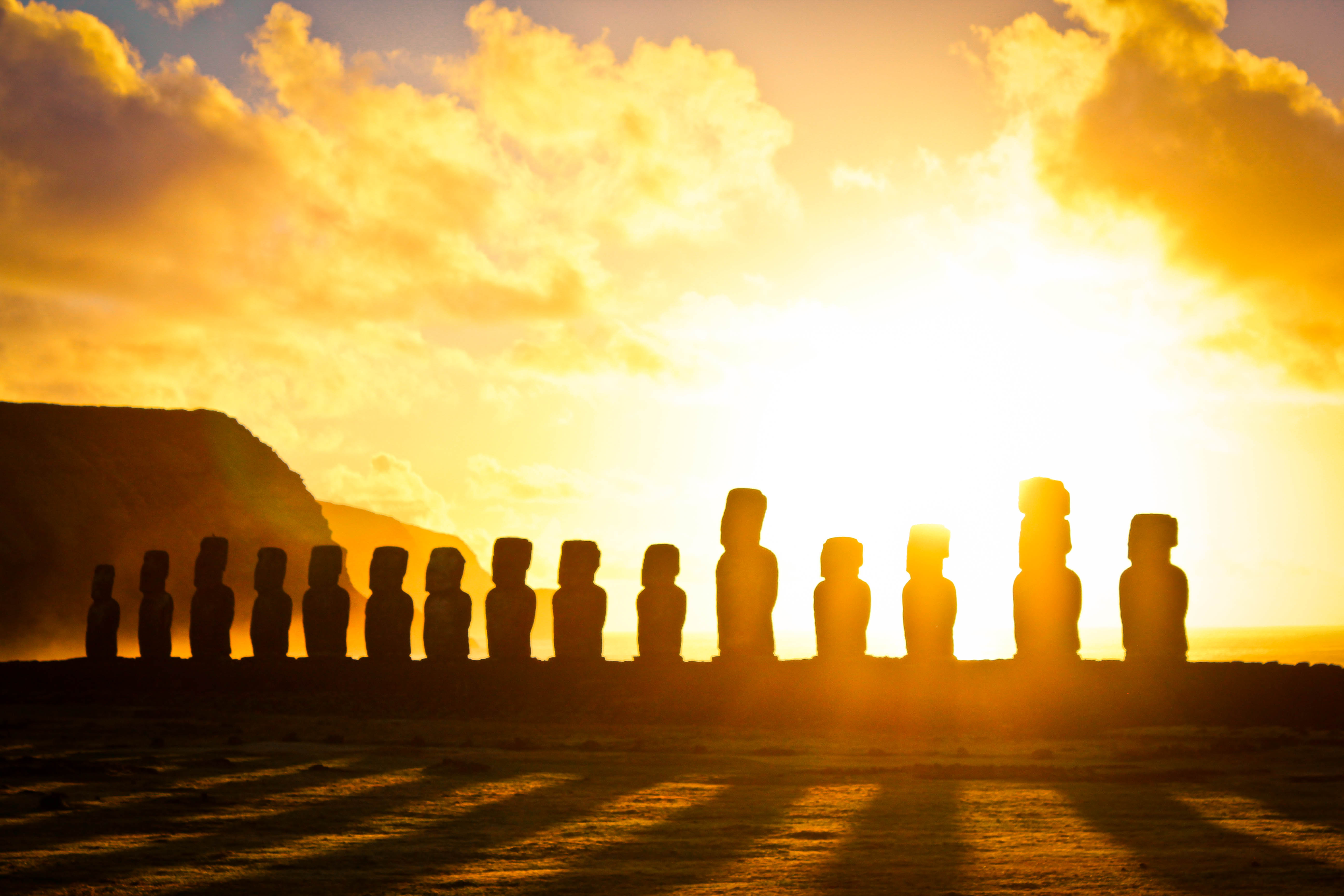 Amanecer en Tongariki, Isla de Pascua